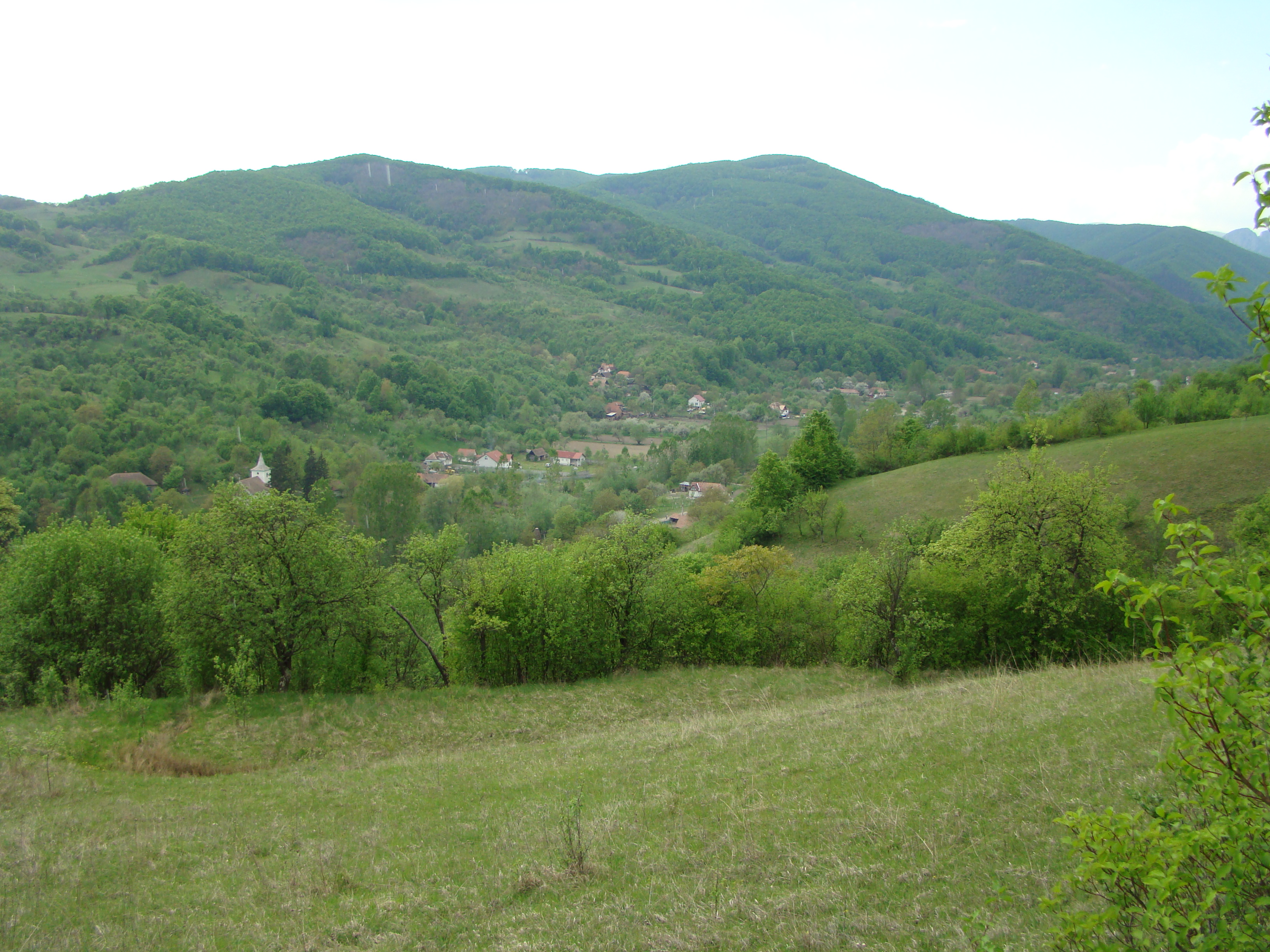 Geoagiu de Sus, Alba